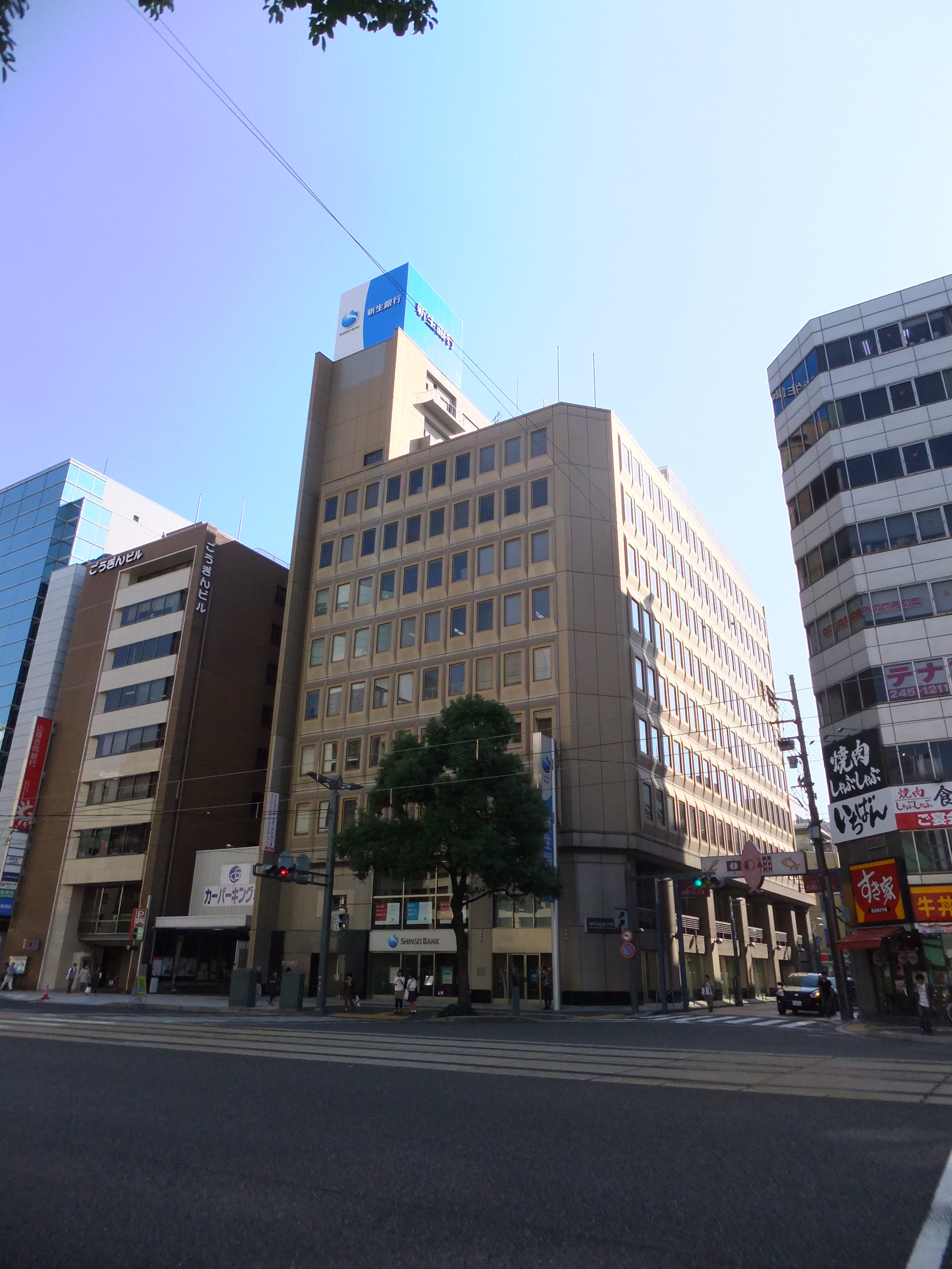 新生銀行広島支店